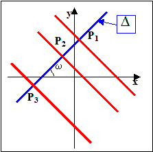 Construction des droites de Poisson